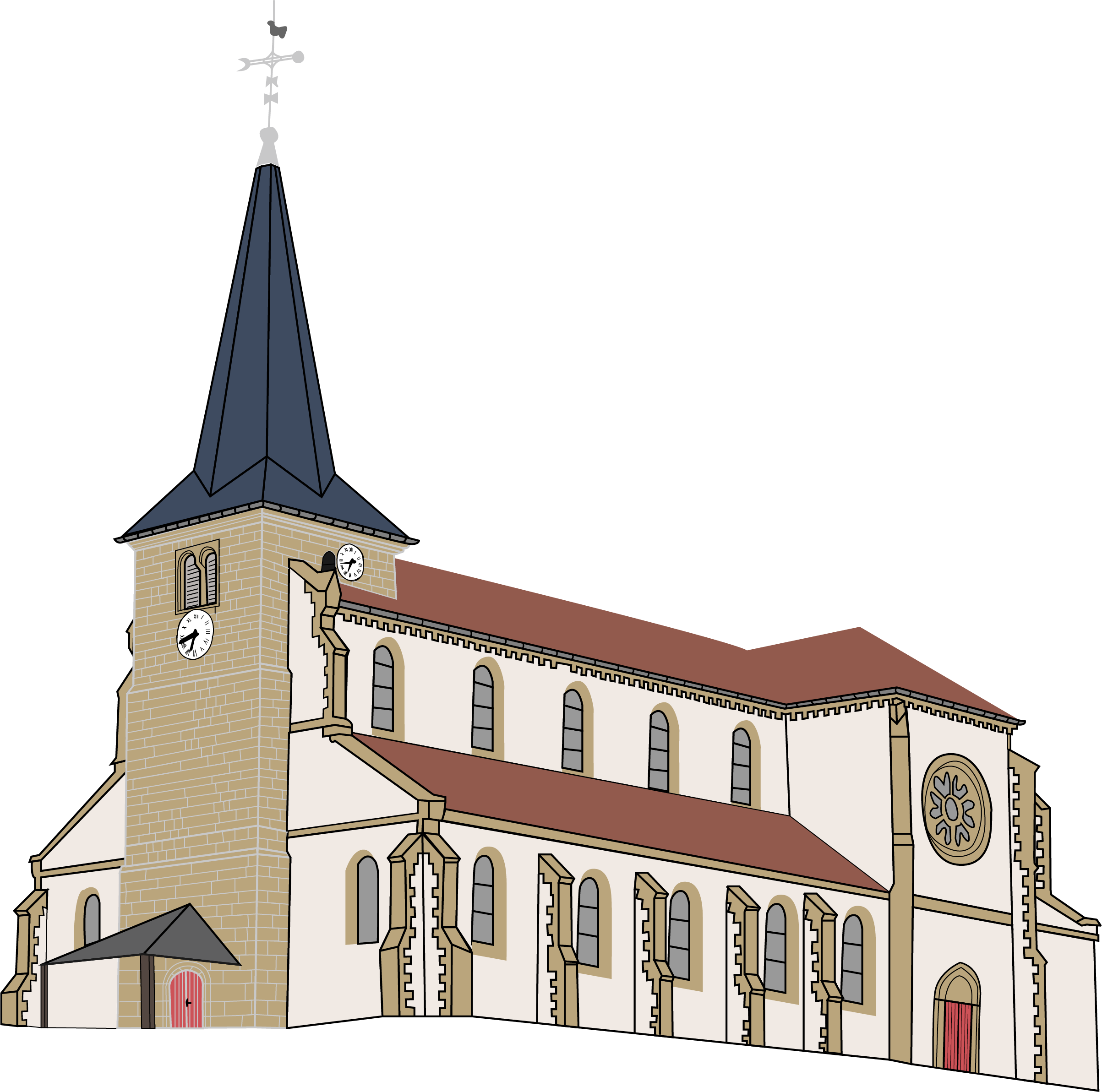 Dessin vectoriel Grandvillers